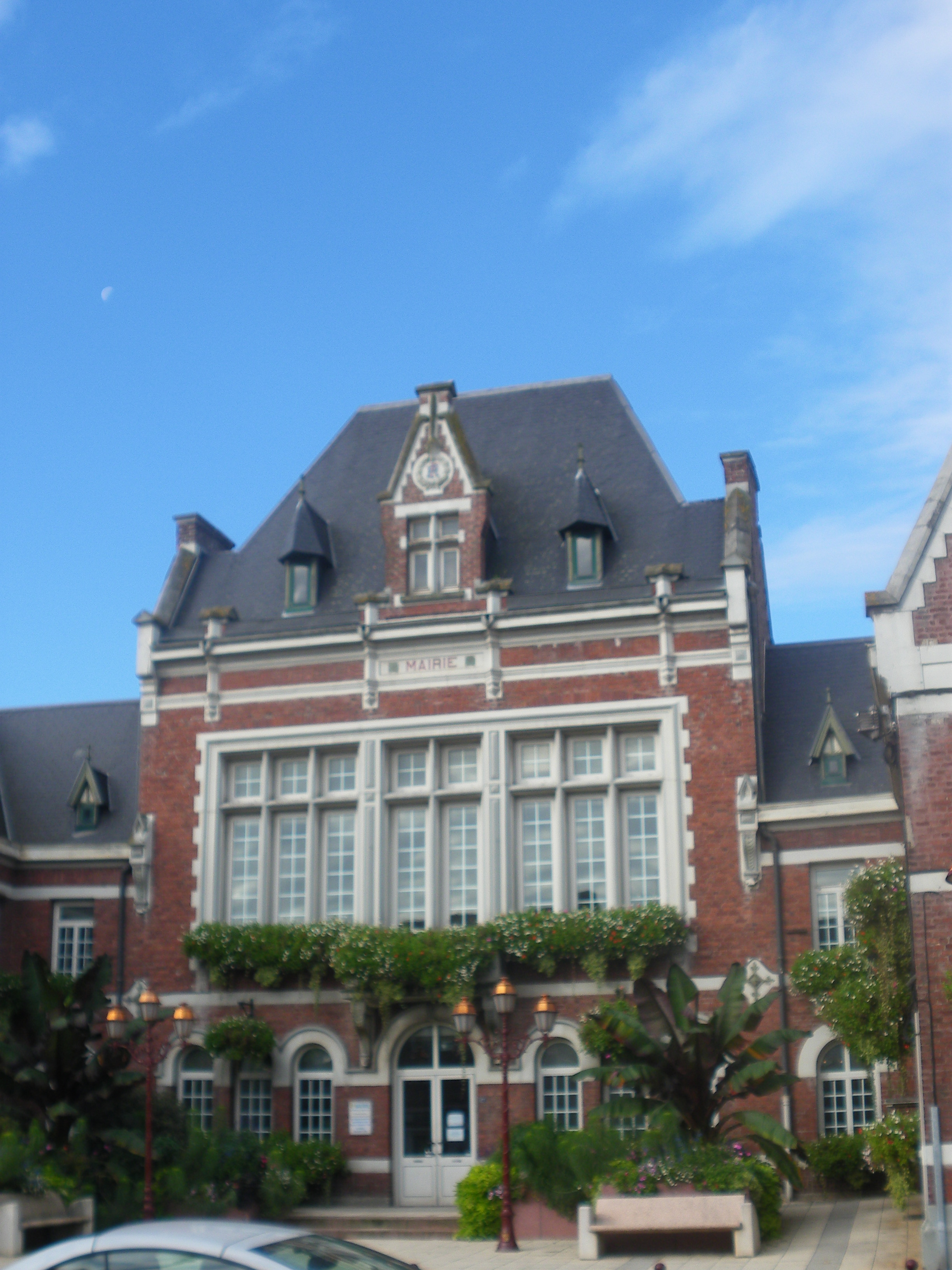 Vue de la mairie de Noyelles-sous-Lens.